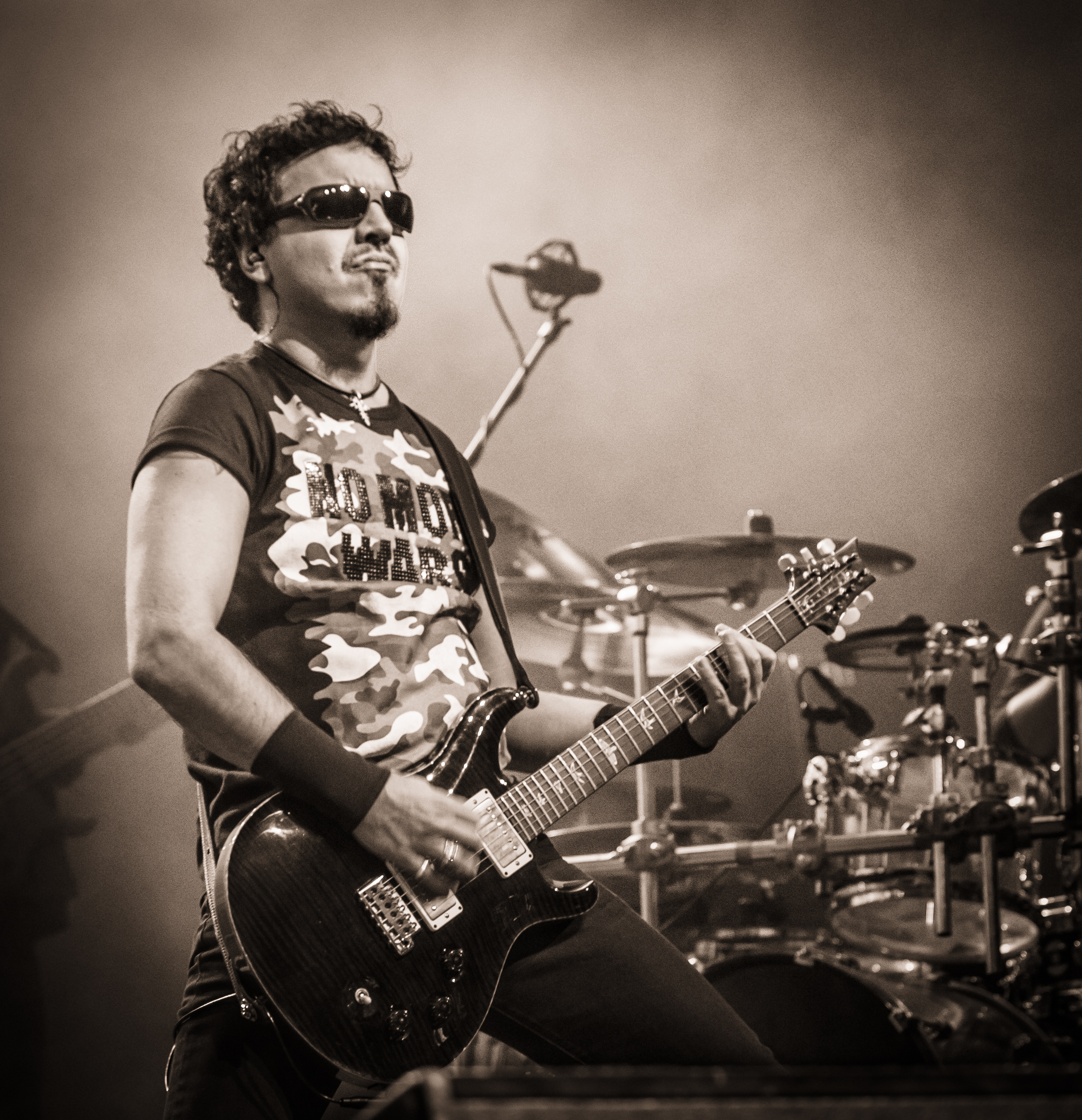 Wojtek Balczun, gitarzysta zespołu Chemia podczas Rocket Festiwal 2013 w Warszawie.